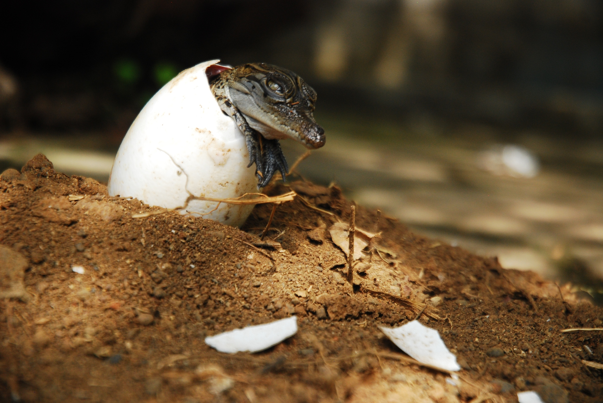 Basa Jawa: Ndog baya kang netes ing kebon binatang Semarang, Mangkang